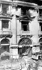 Vista del edificio llamado Casa del Pueblo y sede central del Partido Socialista en la Avenida de Mayo de la Ciudad de Buenos Aires que fuera quemado por manifestantes en 1953.